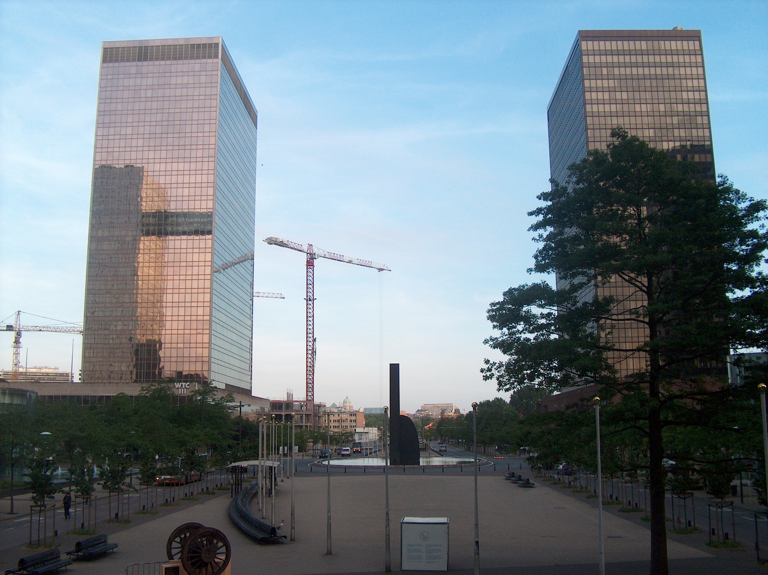 Le boulevard Simon Bolivar à Schaerbeek, Bruxelles, Belgique.